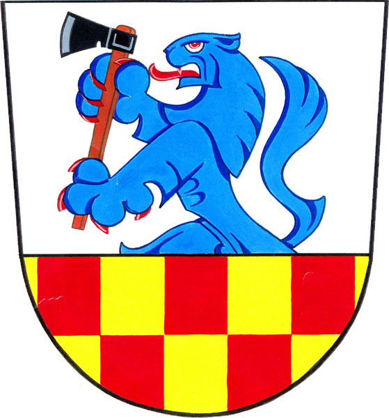 Znak obce Suchý